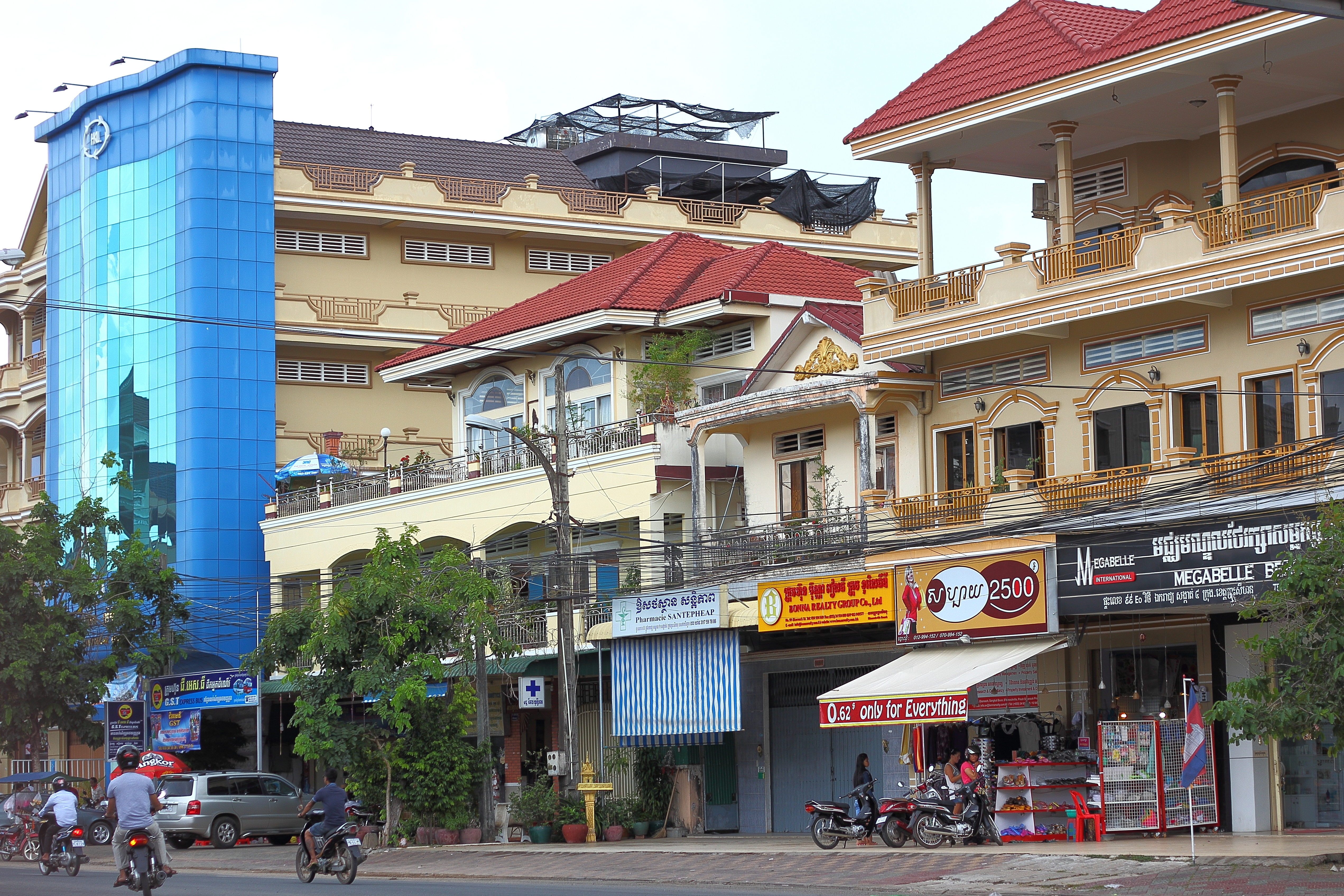 Сиануквиль. В центре города ភាសាខ្មែរ: ខេត្តព្រះសីហនុ